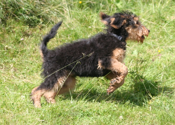 Cucciola di Airedale Terrier di tre mesi